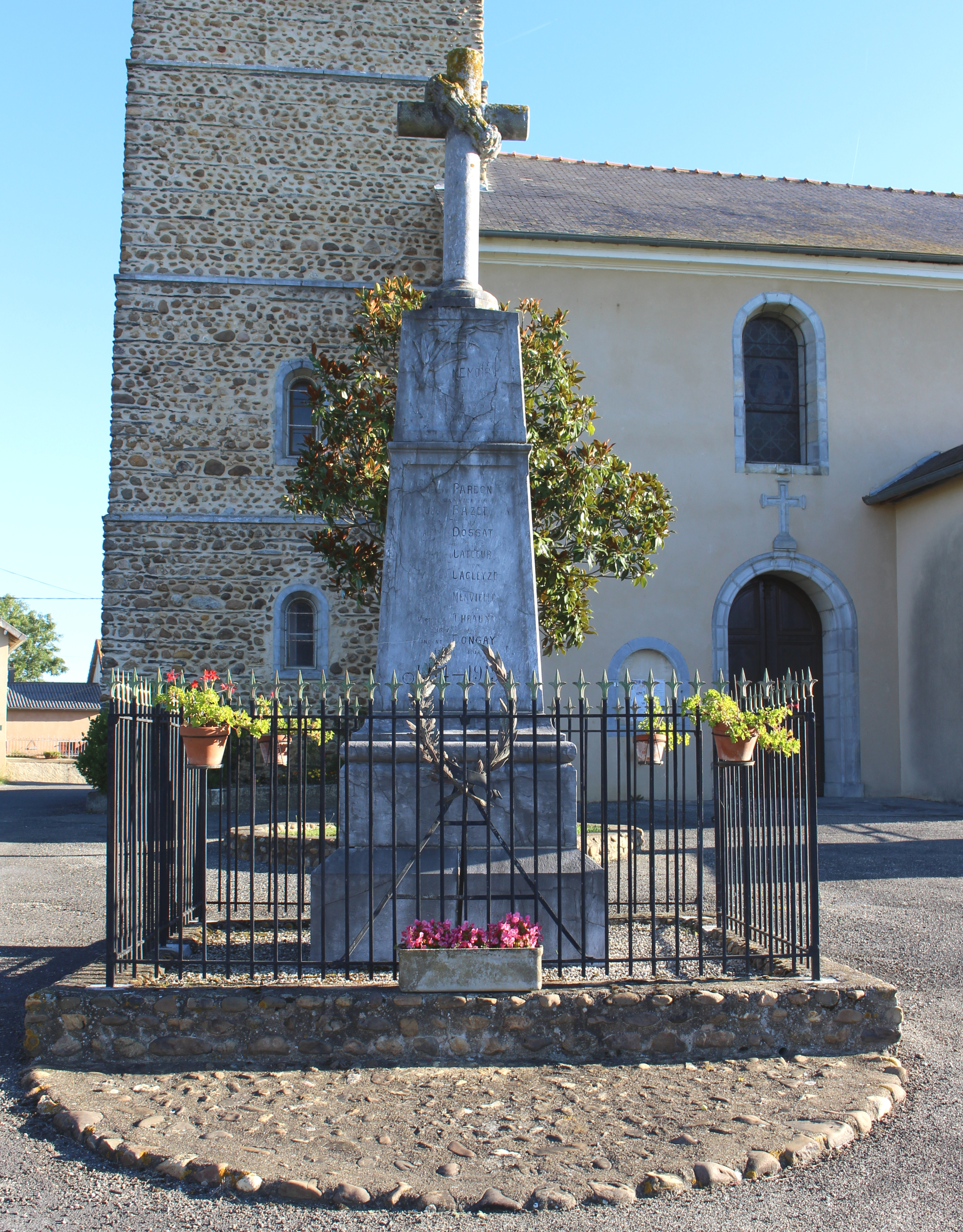 Monument aux morts de Laslades (Hautes-Pyrénées)